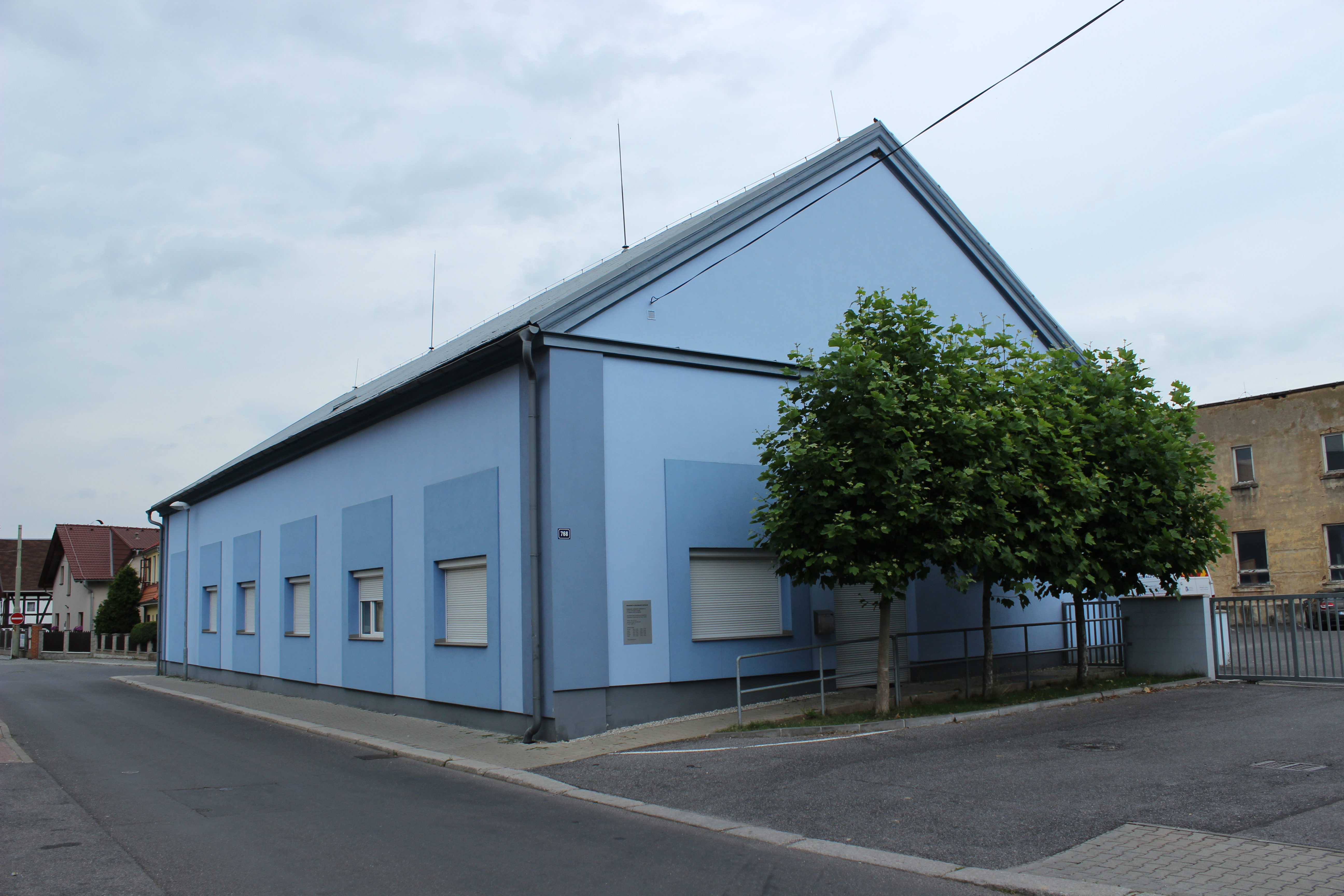 Sídlo Frýdlantské vodárenské společnosti ve frýdlantské Zahradní ulici.